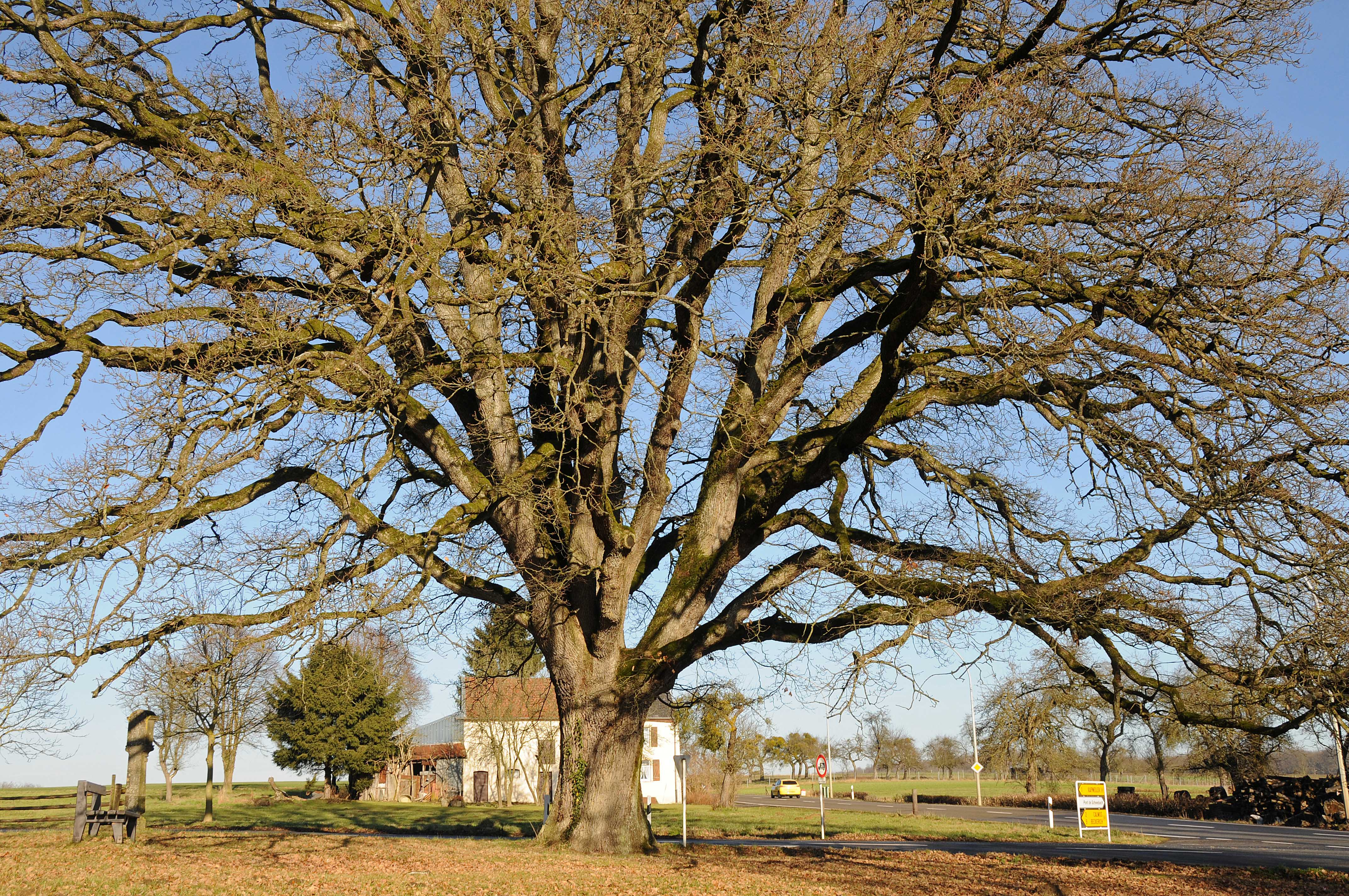 Eech zu Sëll 2.